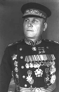 Il maresciallo dell'Unione Sovietica Ivan S. Konev